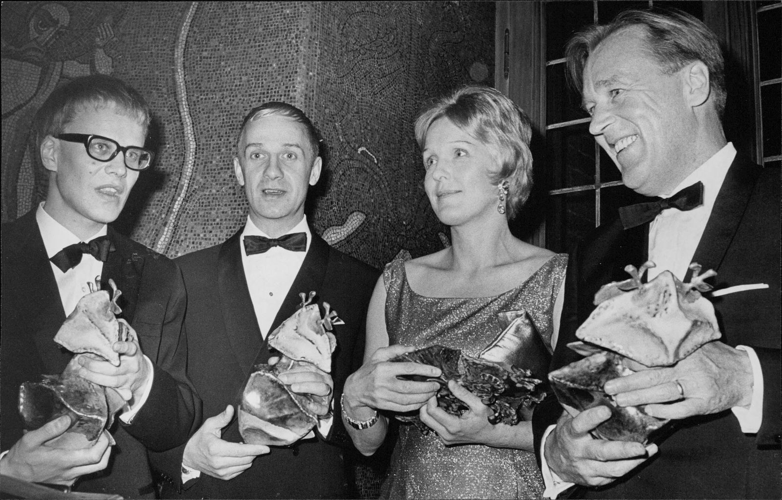 Foto från Guldbaggeutdelningen 1965 infört i Svenska Dagbladet 1965-10-16 med följande bildtext: "Med guldbaggarna i famnen möttes fr. v. Leif Furhammar, Jarl Kulle, Eva Dahlbeck och Arne Sucksdorff."